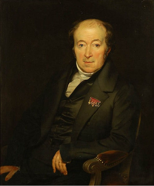 De schilder Mattheus Ignatius van Bree (1773-1839), vastgelegd door Antoon of Antoine Van Ysendyck (1801-1875).